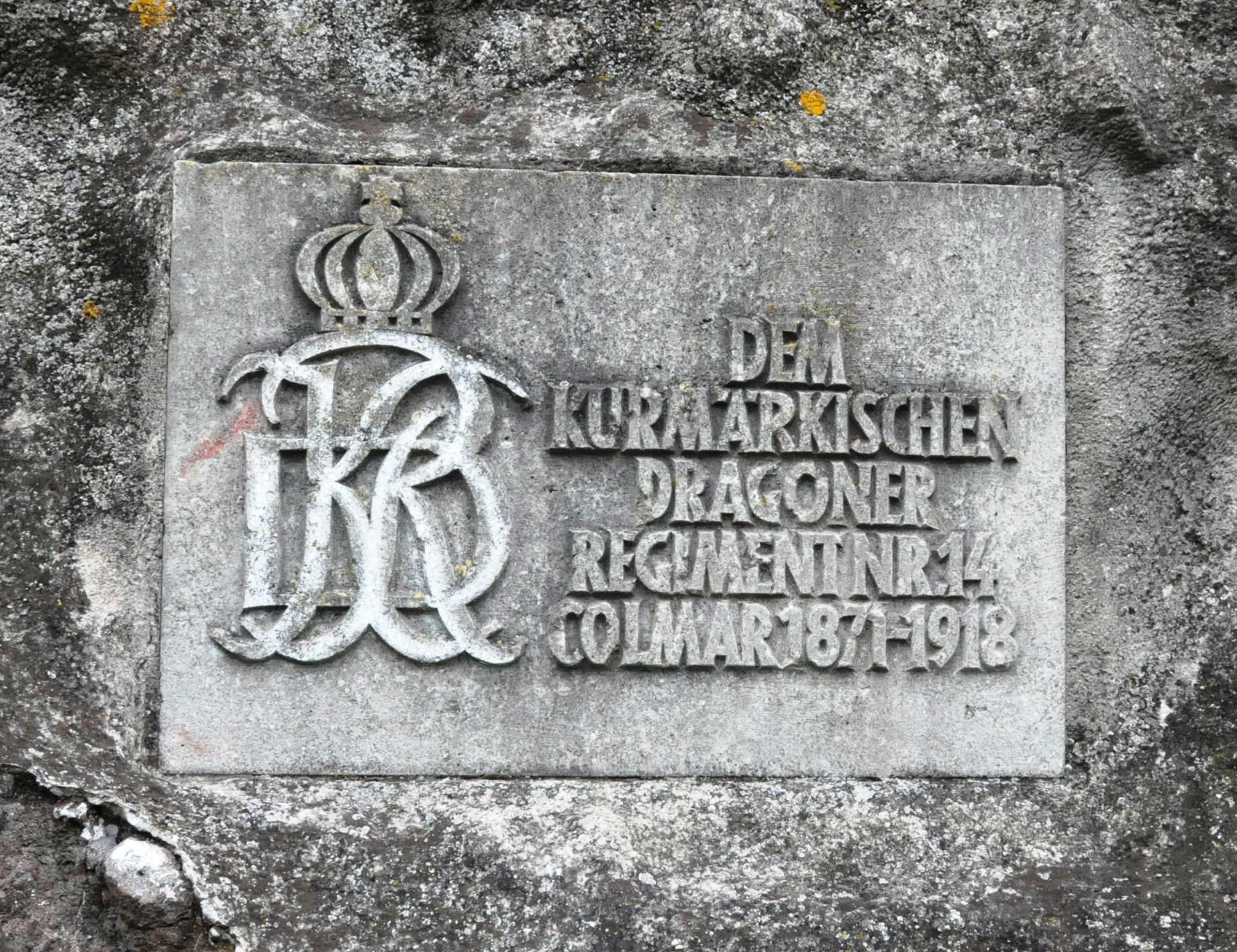 Breisach am Rhein, Eckartsberg: Gedenktafel für das 14. Kurmärkische Dragoner-Regiment